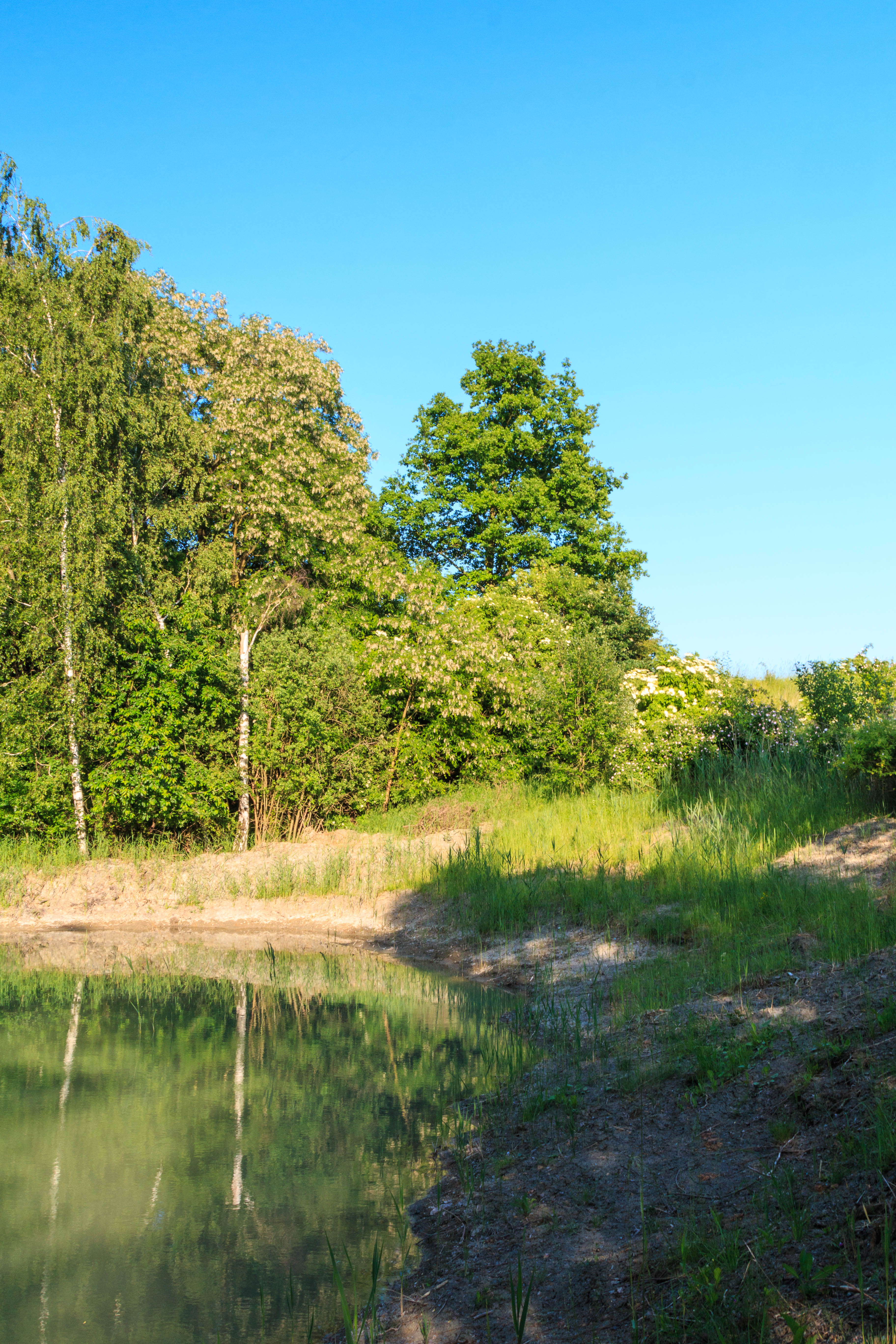 Přírodní památka Michnovka-Pravy Project: Chráněná území.